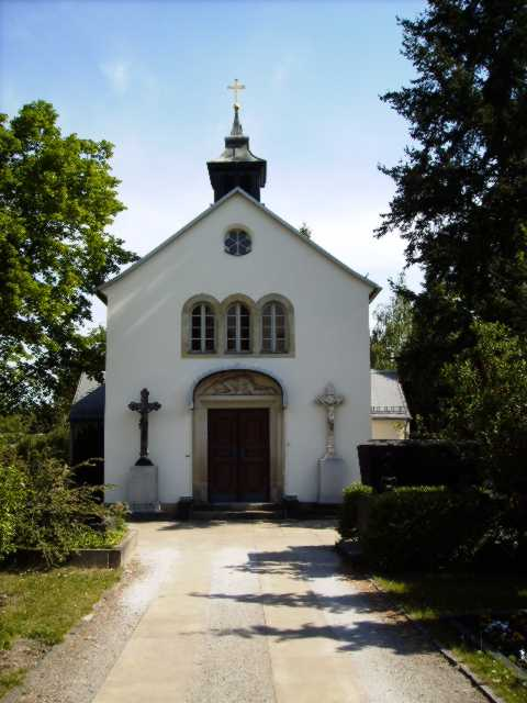 Dresden Alter Kath. Friedhof Friedhofskapelle